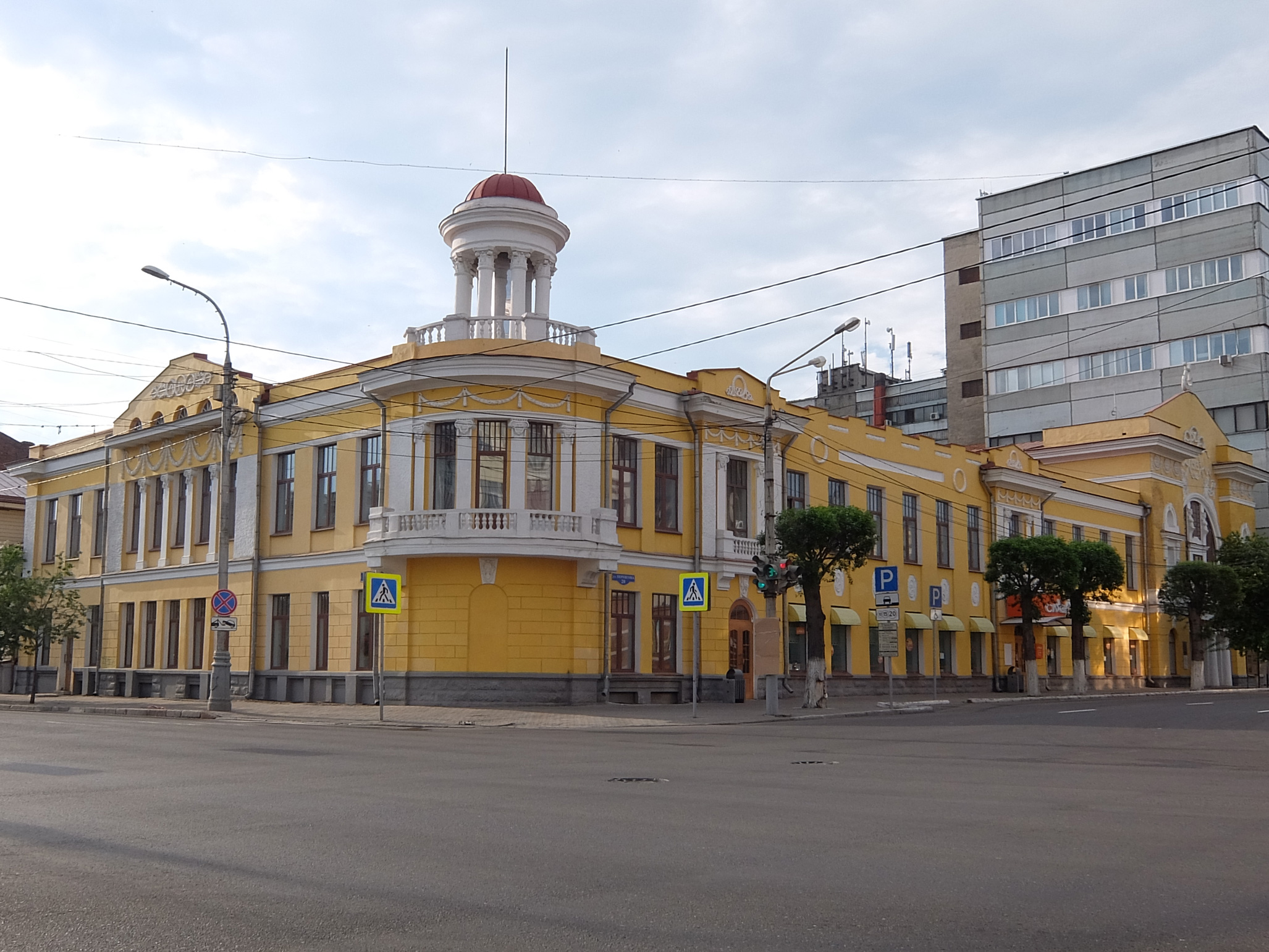 Историческое здание общественного собрания (Дом Офицеров)